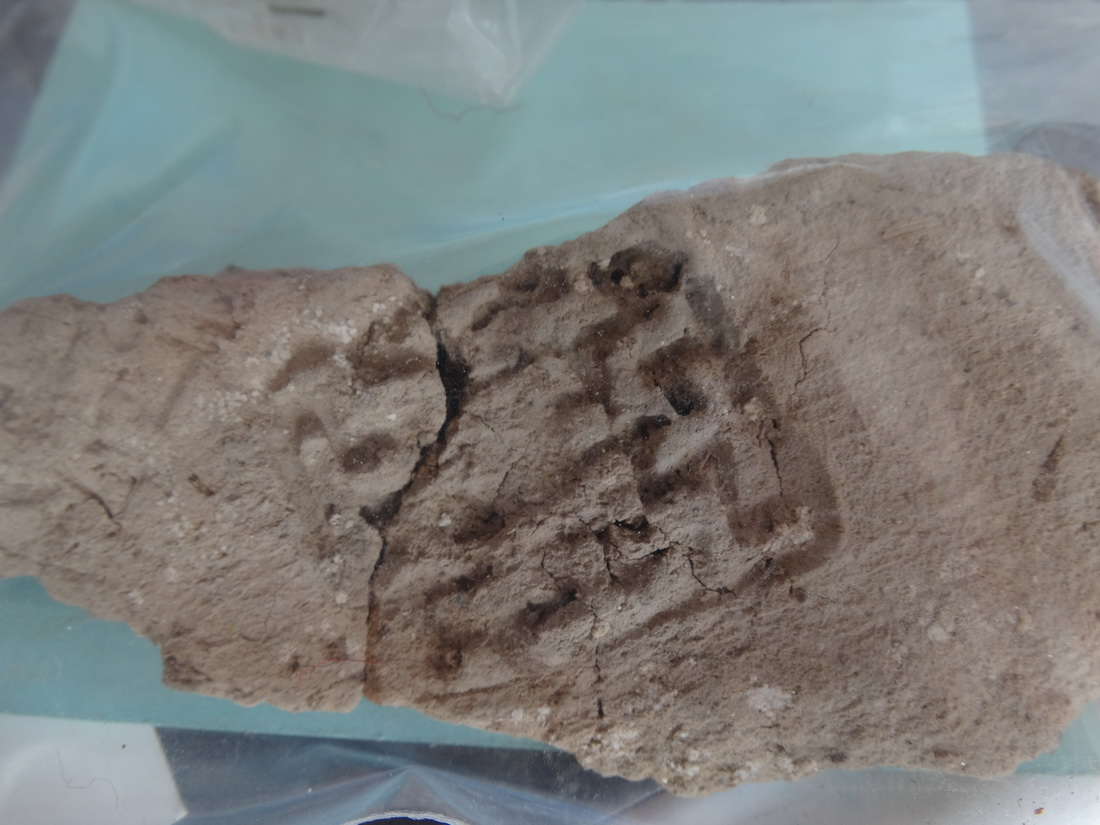 نقش مهر 5000 ساله بر روی گل